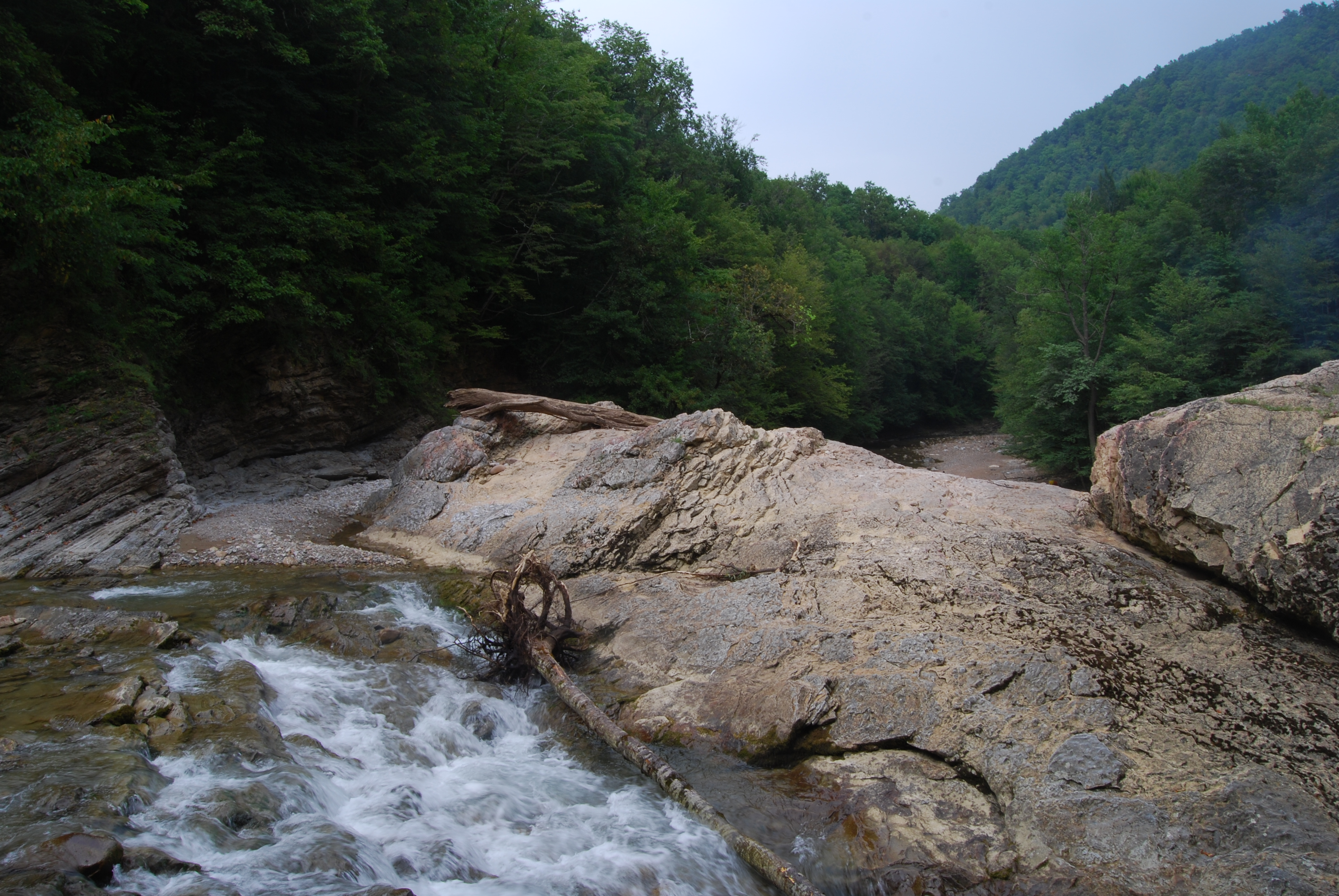 Каньон реки Сахрай, Майкопский район This image is related to the protected area of Russia number 0110033